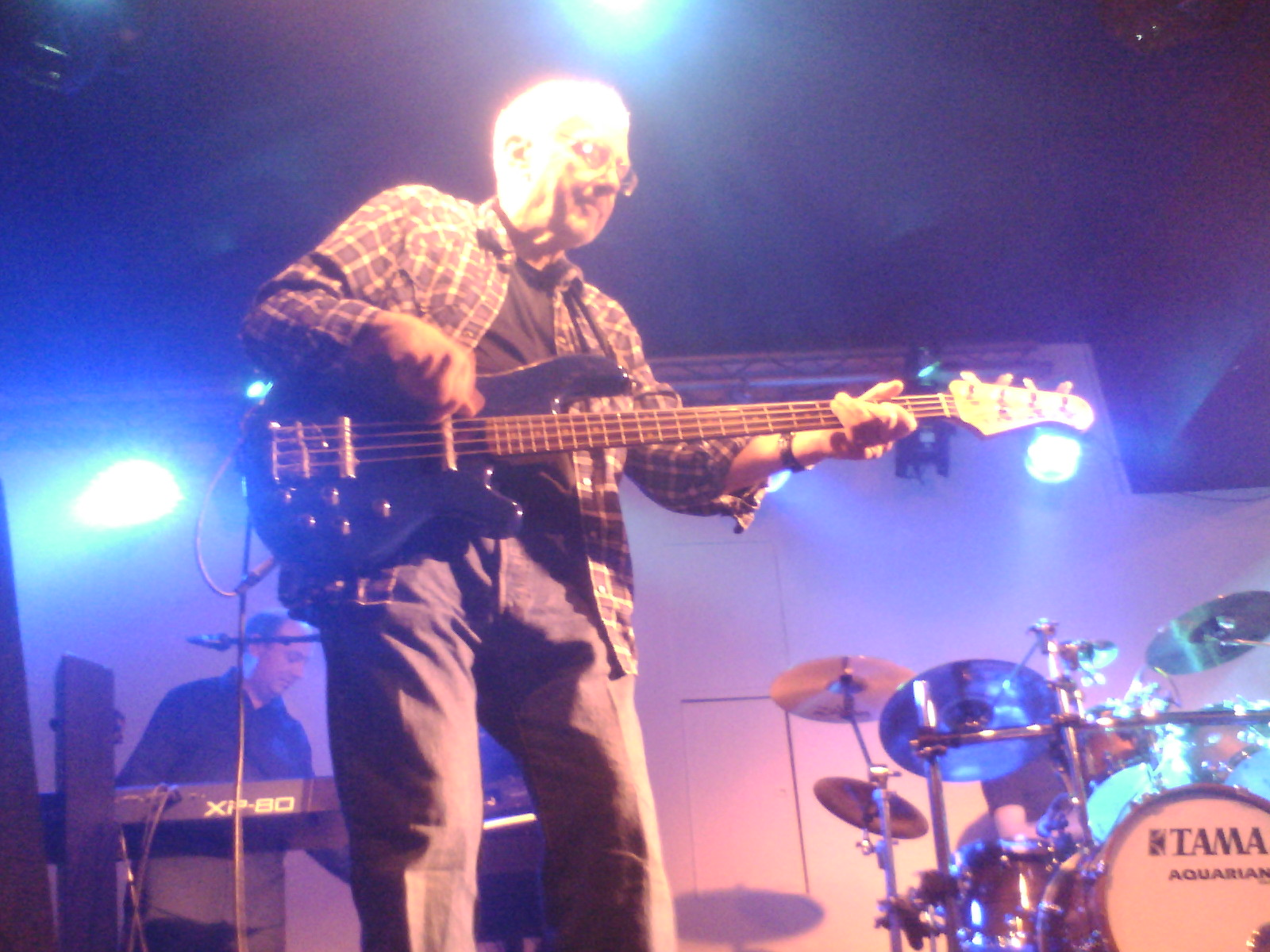 Official Jerry Scheff picture